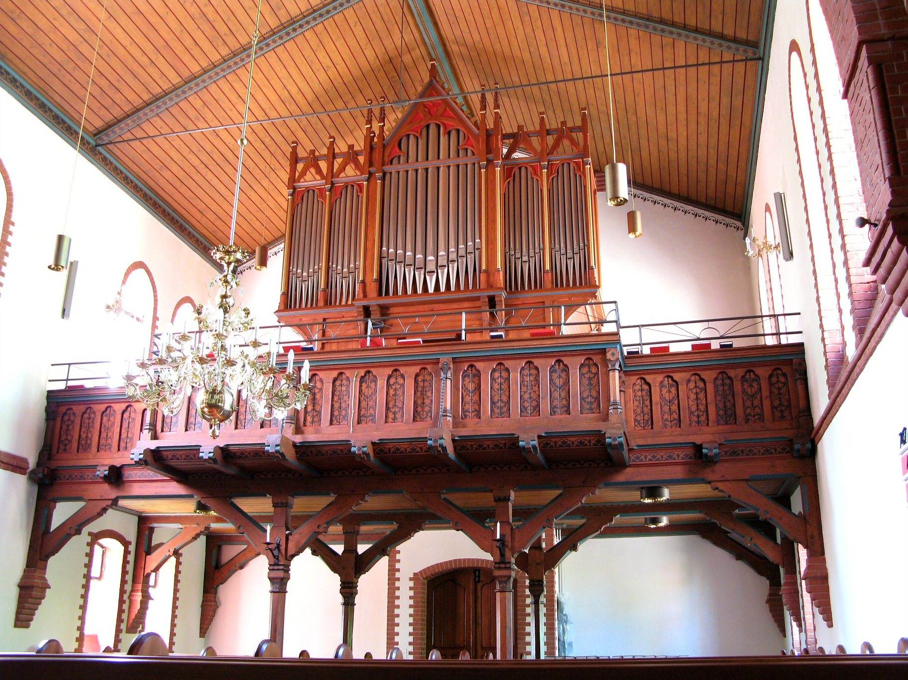 Orgel in Hollen